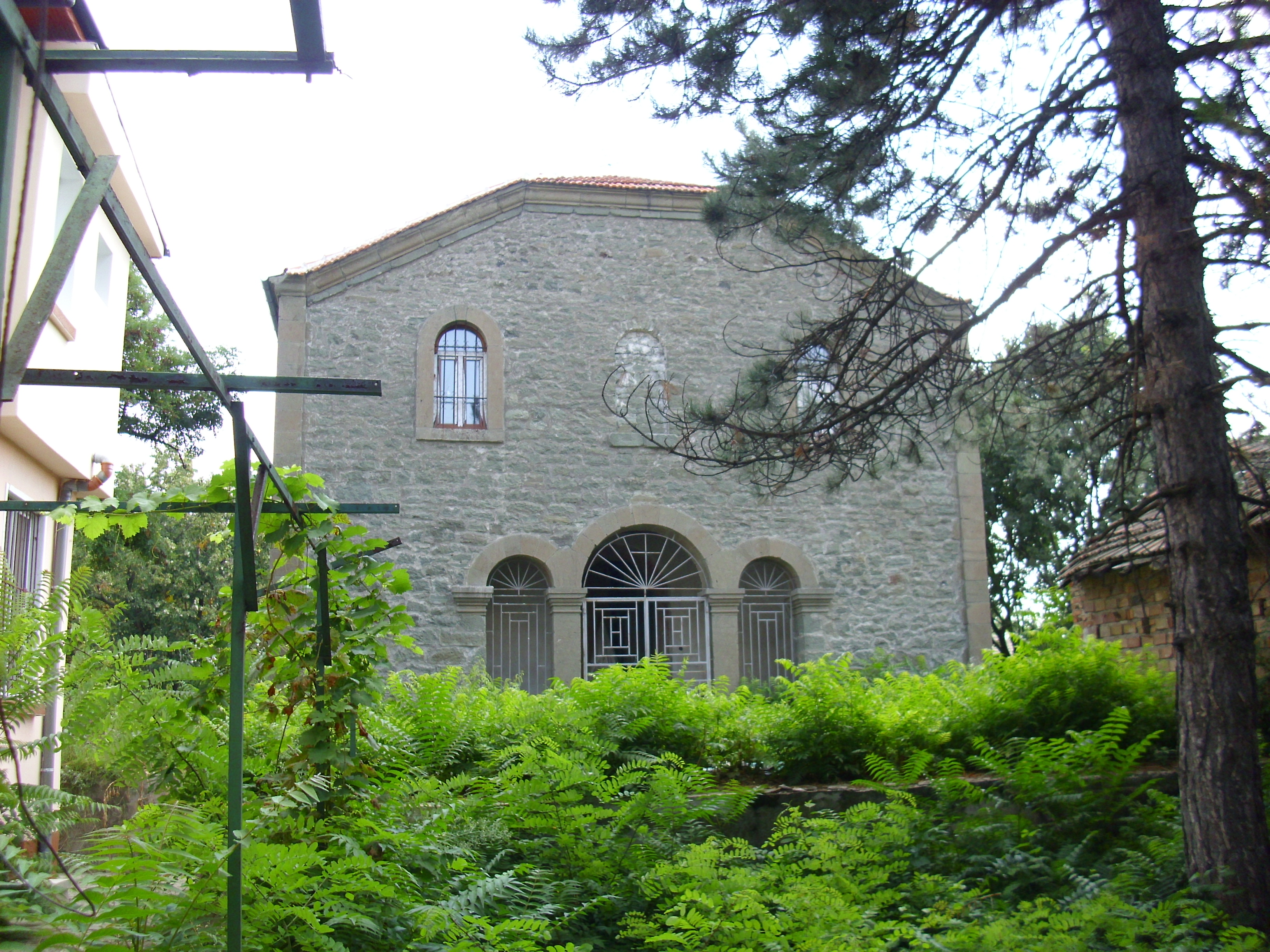 Църква "Св. Архангел Михаил" в стил псевдобазилика от дялан камък с дървен покрив в село Крушово, Карнобатско